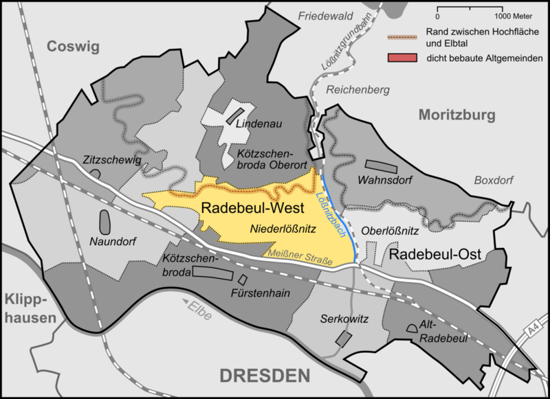 Karte der Stadtteile und Umlandgemeinden Radebeuls, hier Stadtteil Niederlößnitz